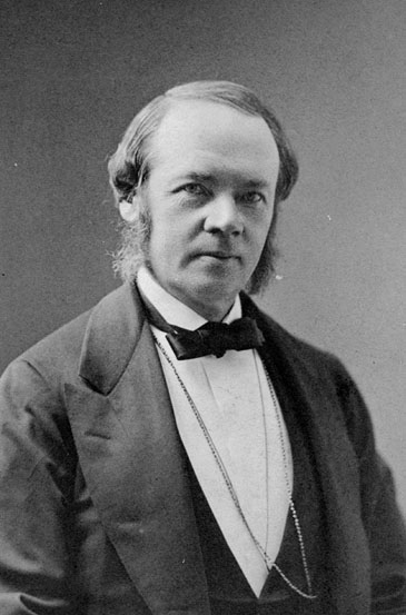 Ole Richter